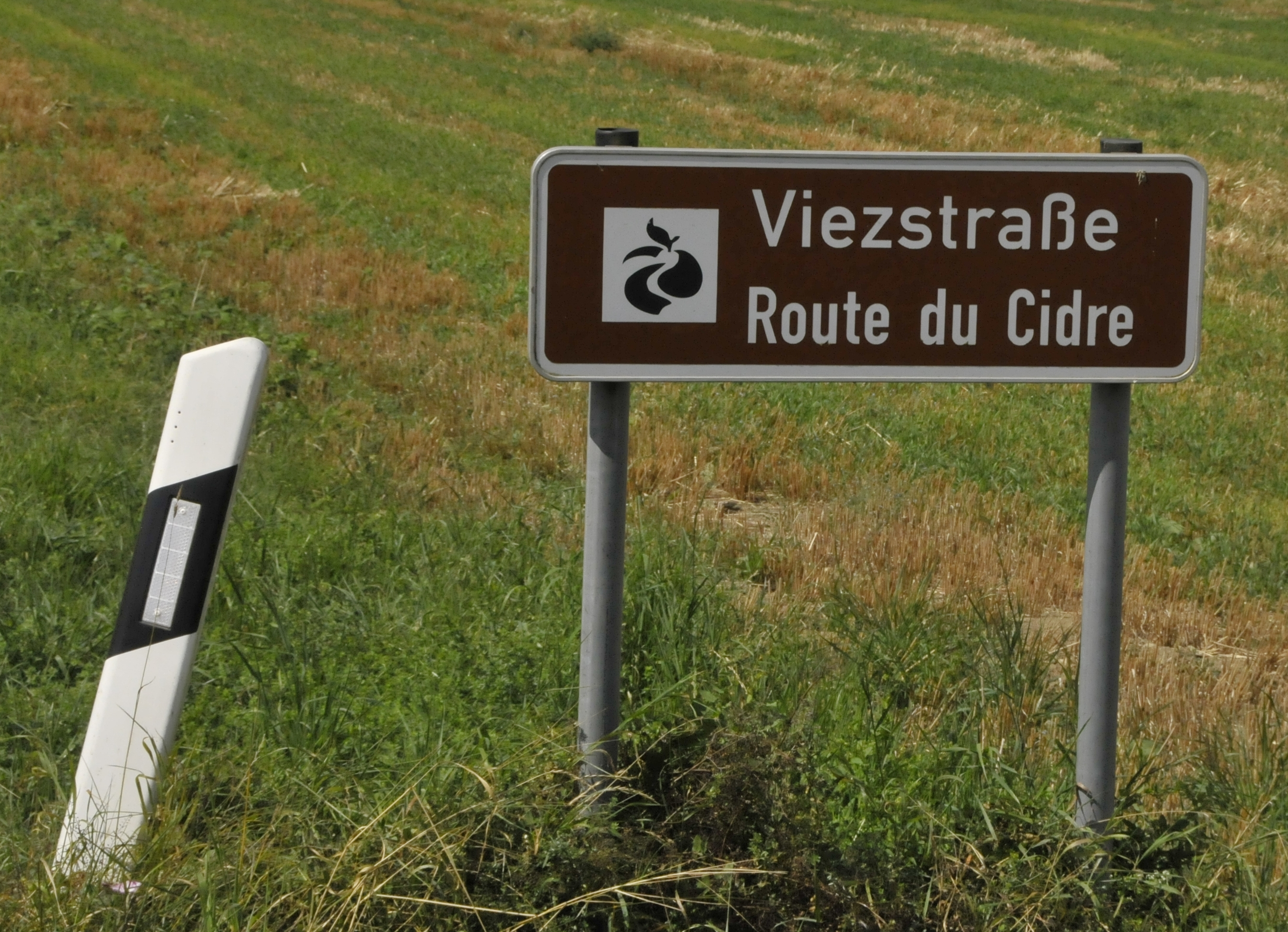 Merzkirchen, Viezstraßenschild